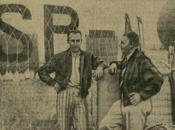 Kapitan Hynek i porucznik Burzyński, zwycięzcy Gordon Bennett Cup w 1933 roku.